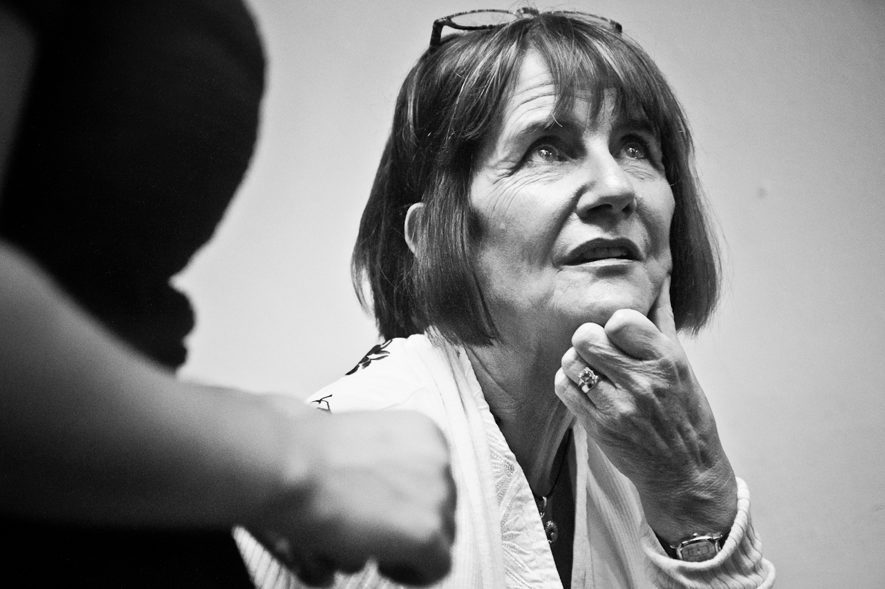 Měsíc autorského čtení 2014